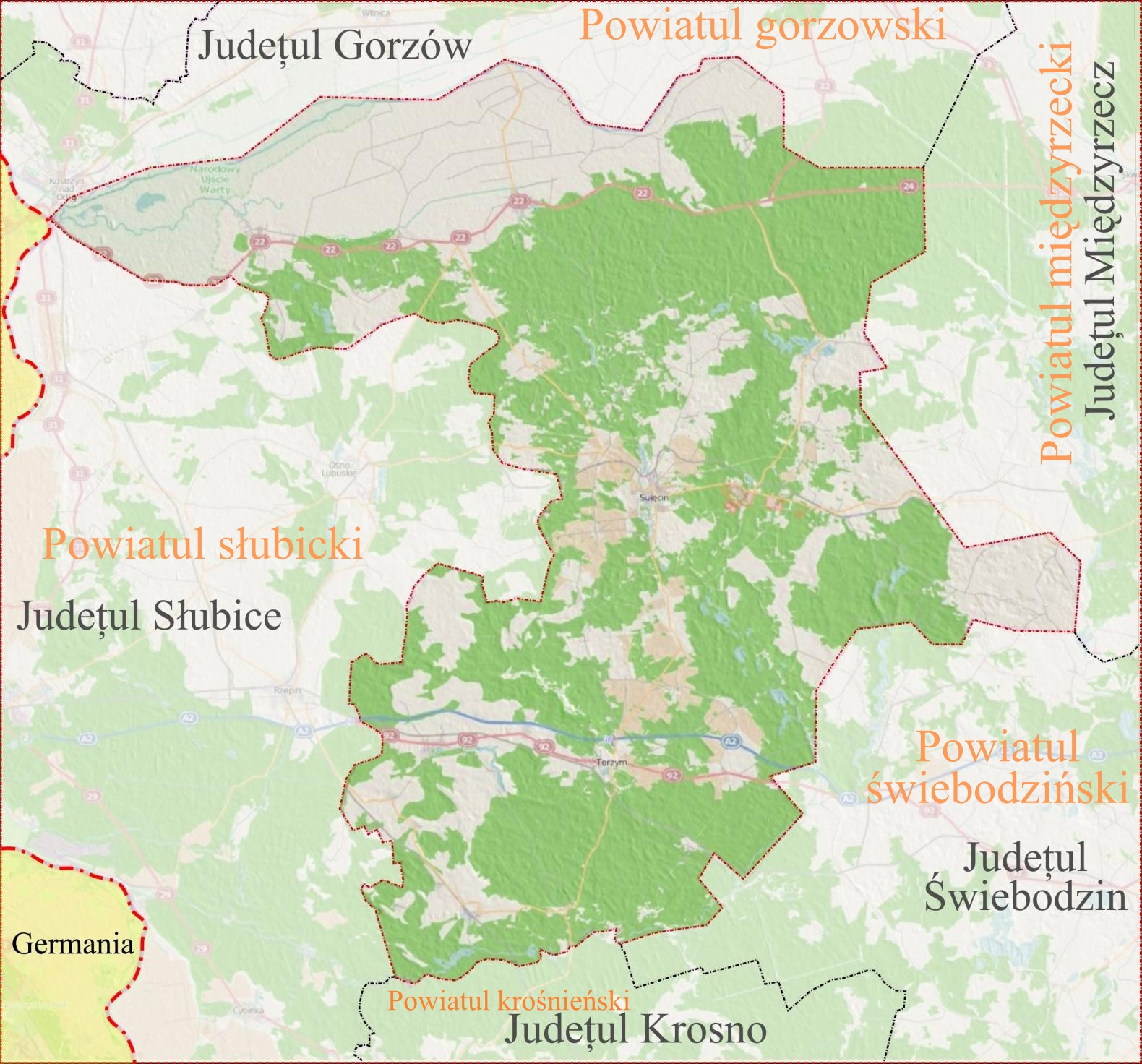 Harta de localizare a Judeţului Sulecin din Voievodatul Poloniei, Lubusz. Coordonate: Top: 52.68 Bottom: 52.17 Left: 14.6 Right: 15.6